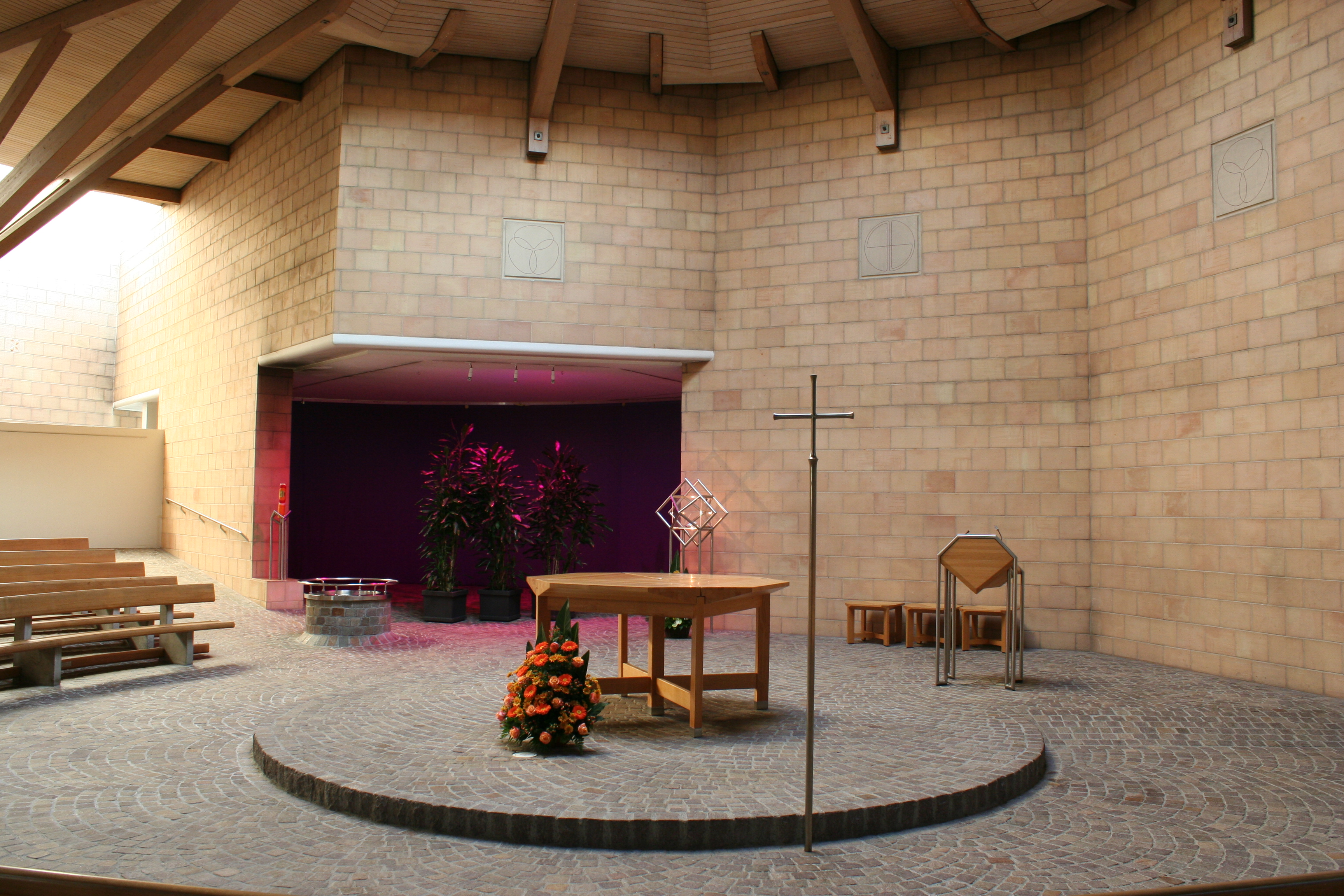 Römisch-katholische Pfarrkirche Christkönig Kloten, Altarinsel